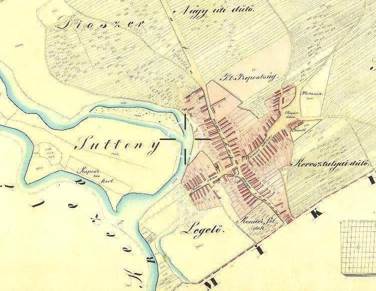 Pápoc község 1856 évi urbéri térképének részlete.